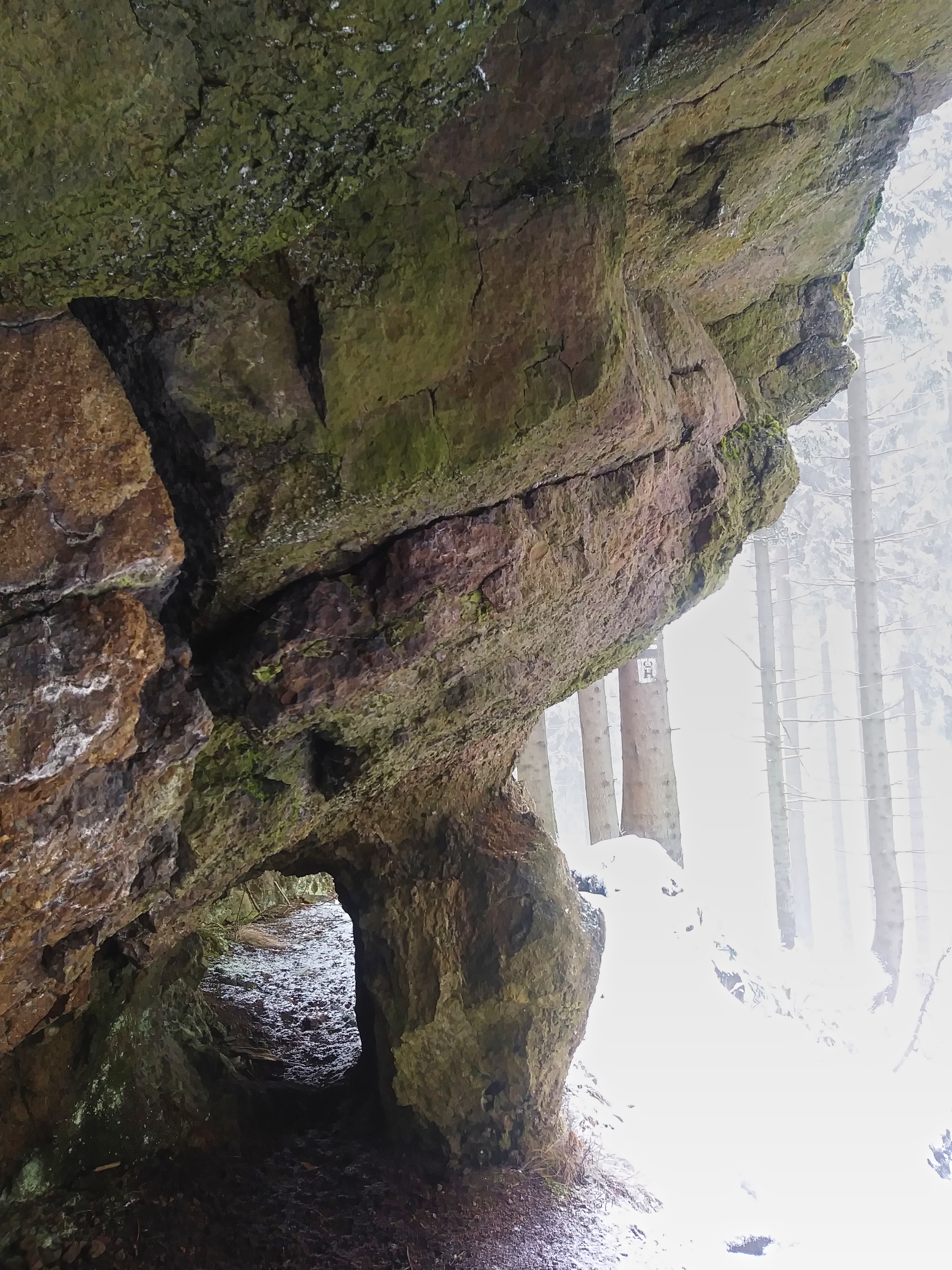 Dorkowa Skała zimą, detal